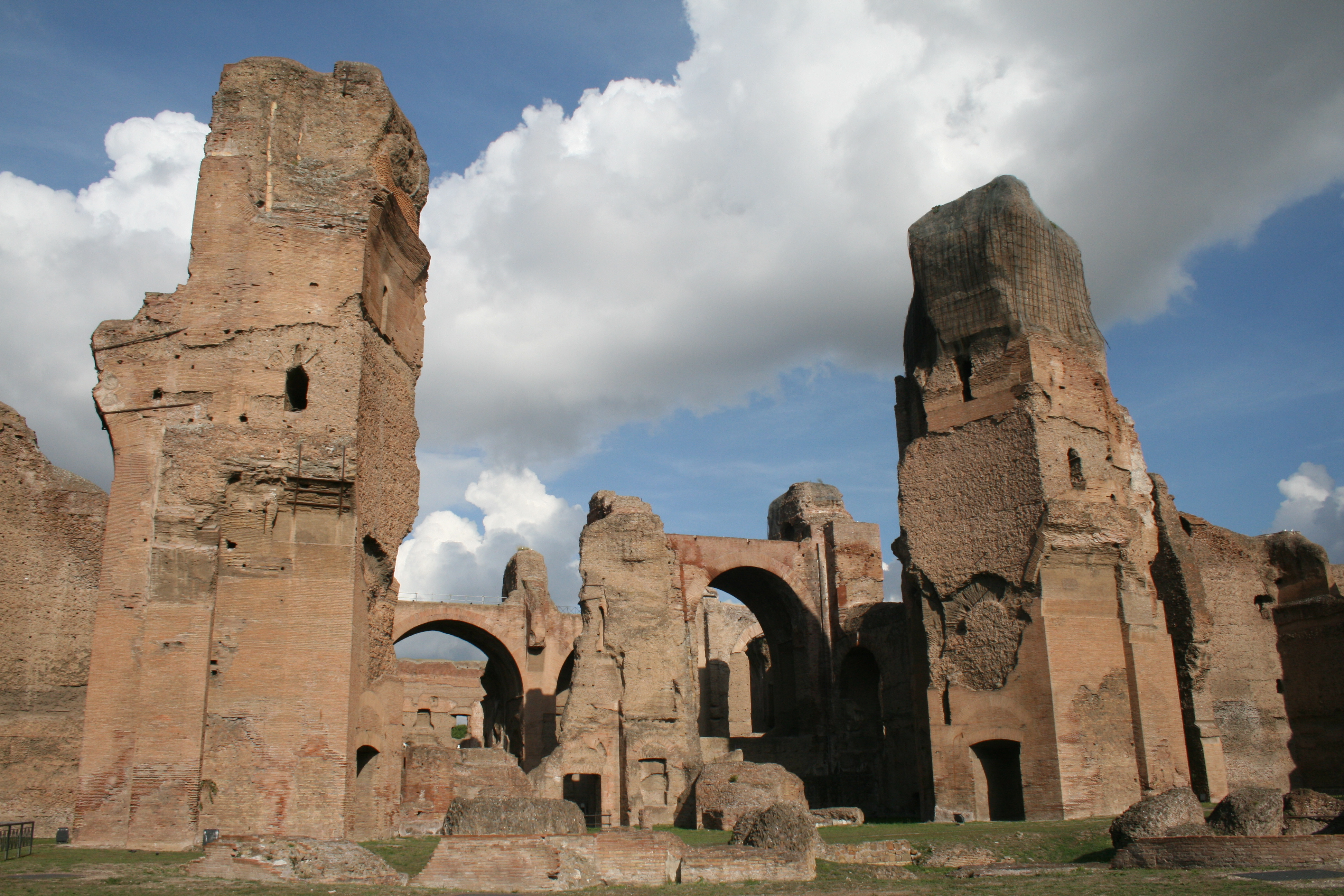 Rom Caracalla-Thermen von Süden